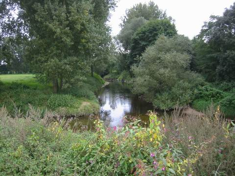 Mündung der Werse in die Ems bei Münster-Gelmer; Bereich im Naturschutzgebiet „Emsaue“ (NSG MS-013)